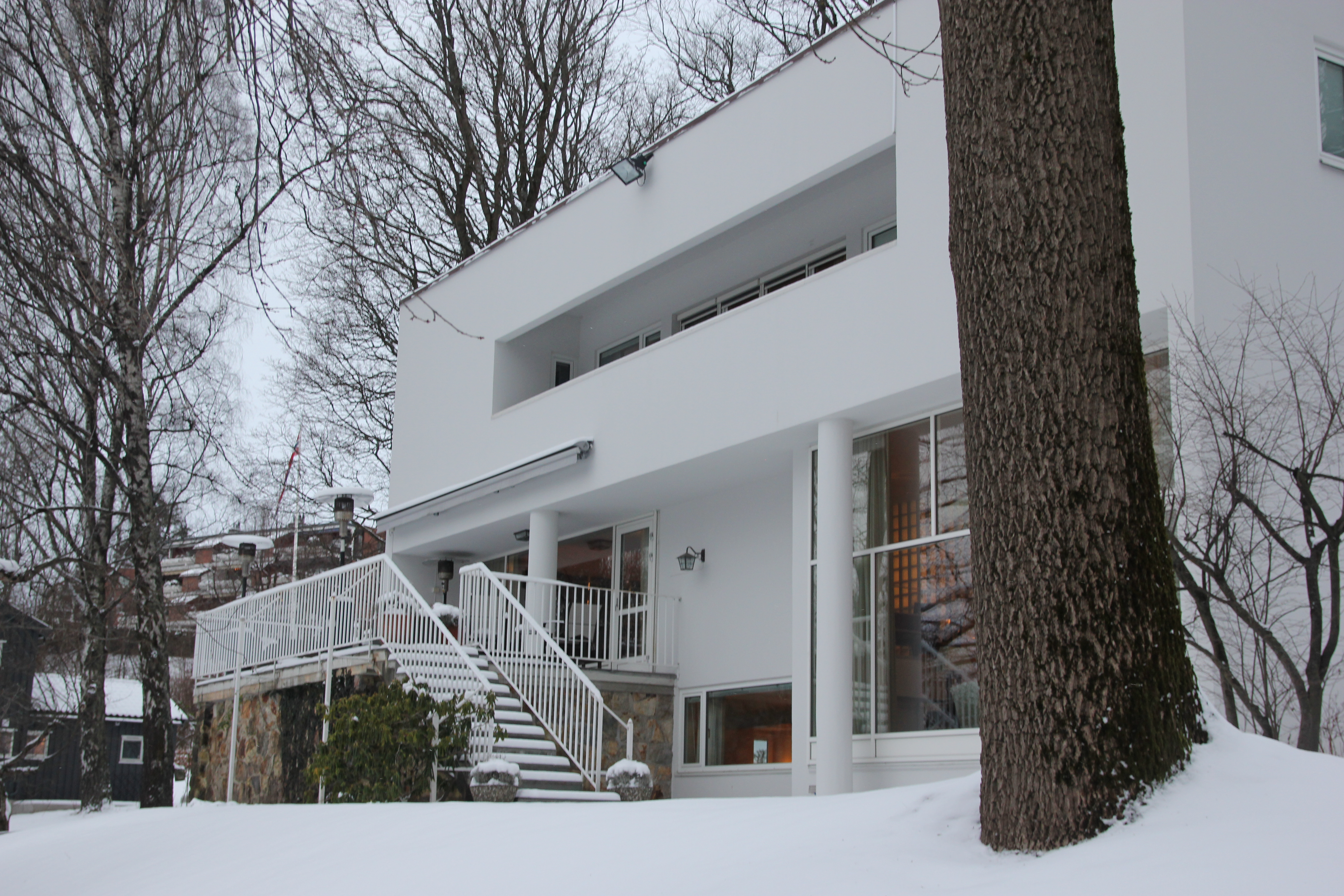 Villa Ditlev-Simonsen, fasade mot hage